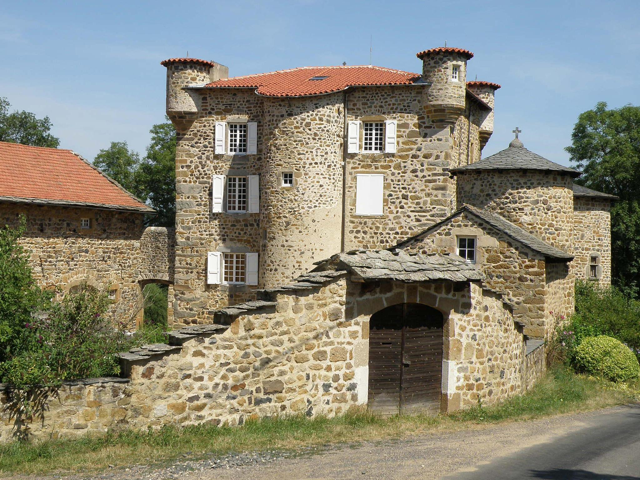 Retournac, dép. de la Haute-Loire, France (Auvergne). Castel de Mercuret, dans le sud de la commune. Au centre : le corps de logis ; à gauche : la grange ; à l'avant à droite : la chapelle.